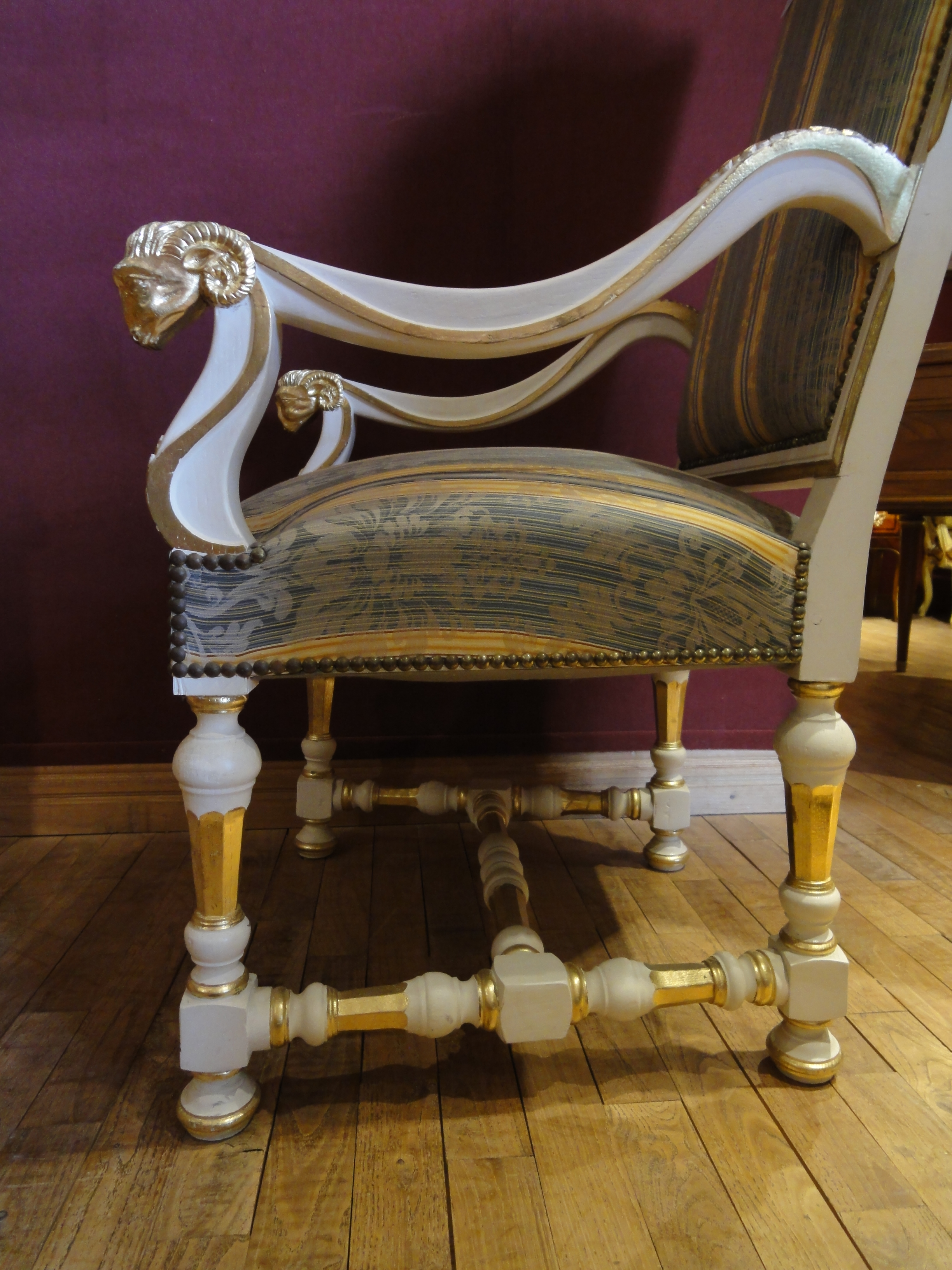 Style Louis XIV, réalisé par les Ateliers Allot Frères.